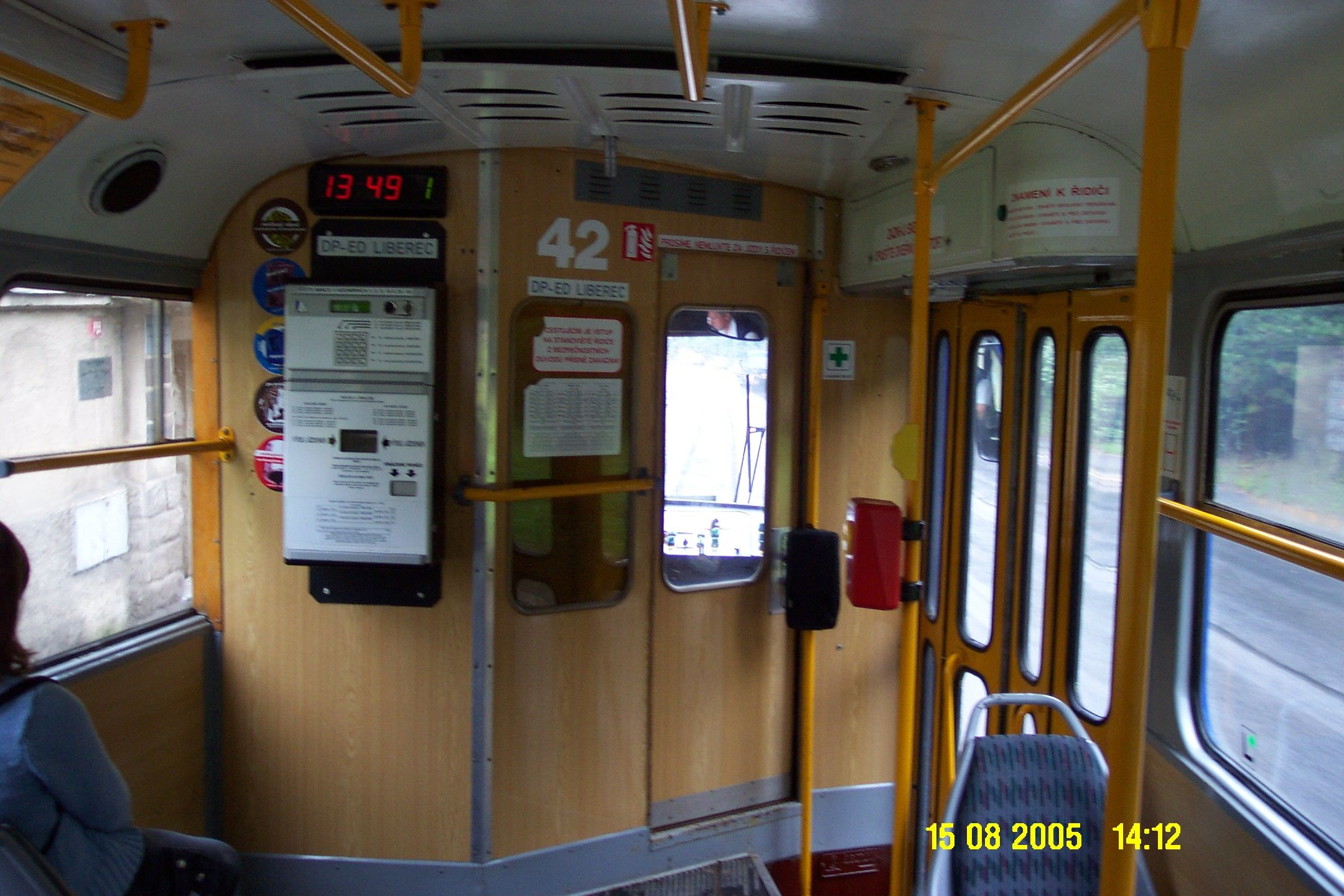 Fotografovaný obrázek. Pořízeno vlastním fotoaparátem v tramvaji ev. č. 42 (typ T3) na tramvajové lince 11 na meziměstské trati mezi Libercem a Jabloncem nad Nisou.